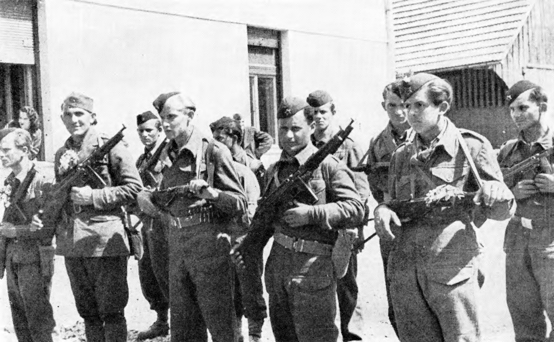 Oddelek »avtomatičarjev« 5. prekomorske brigade, oborožen z angleäkiml in ameriškimi brzostrelkami